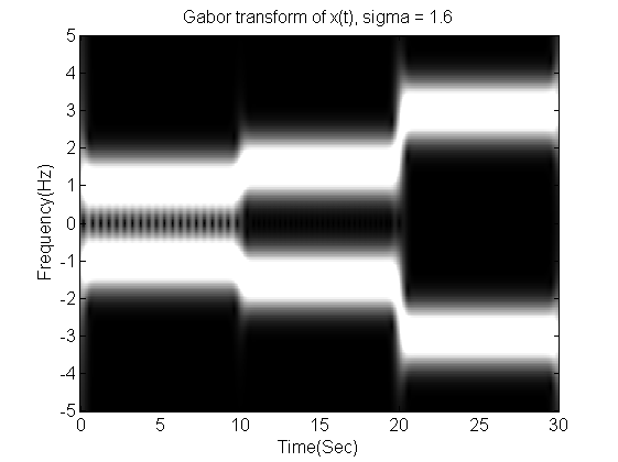 Gabor Transform with Sigma = 1.6